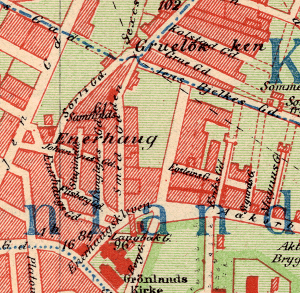 Enerhaugen, Oslo.